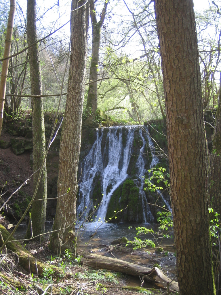 Kleiner Wasserfall des Maisenbachs (Tauber-Zufluss) bei Gamburg